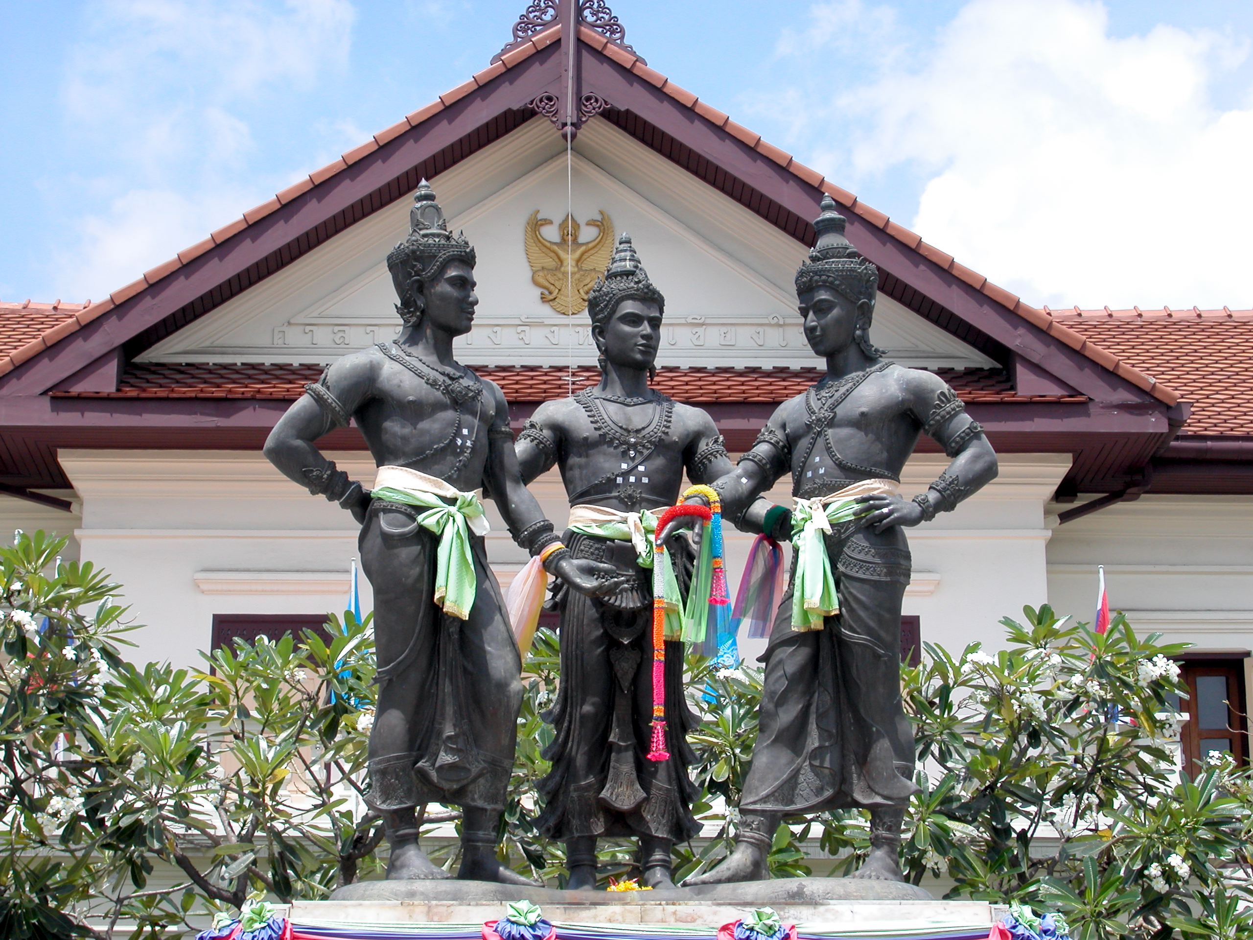 Het monument van de drie koningen in de oude binnenstad van Chiang Mai